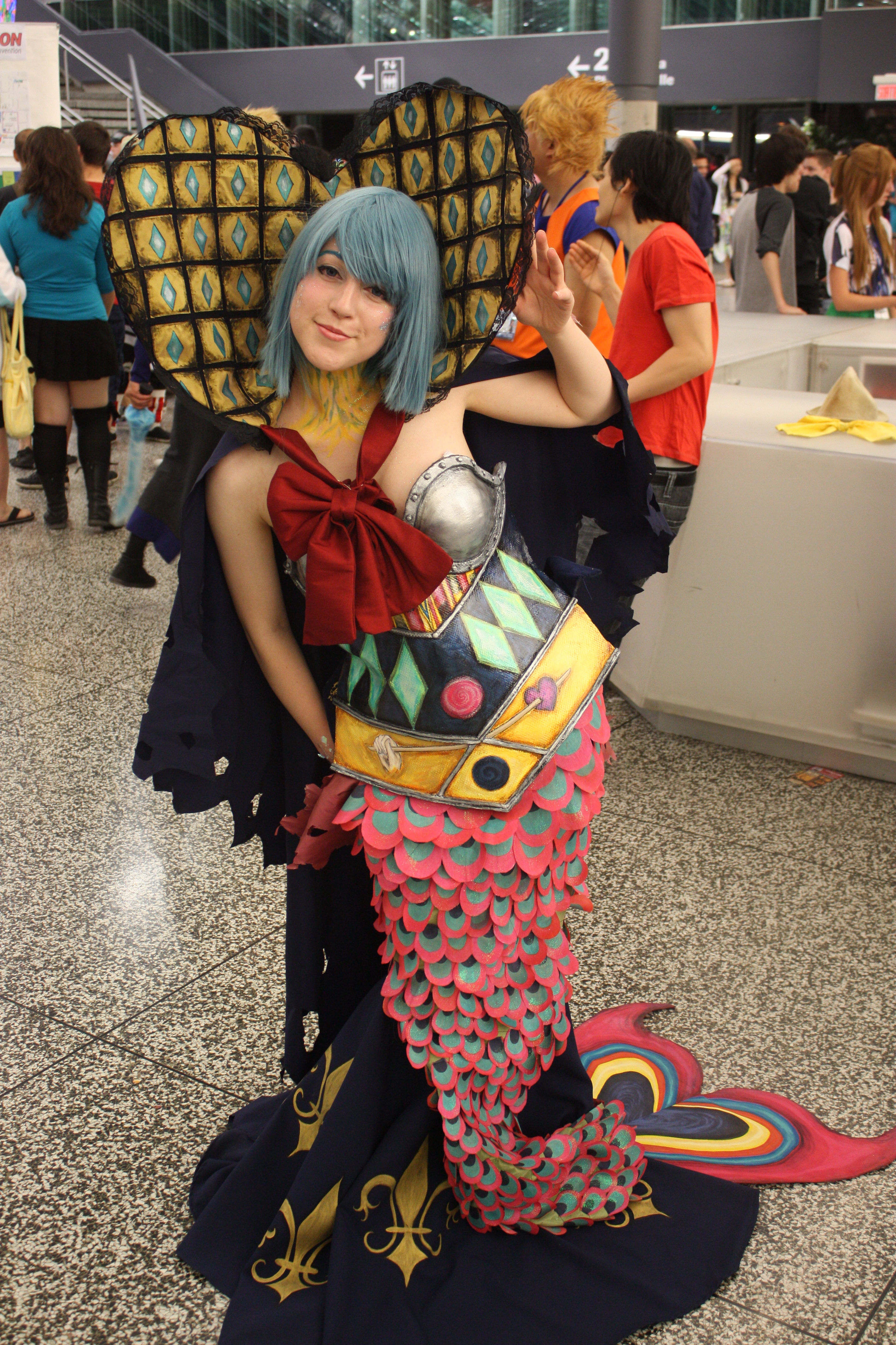 Otakuthon 2014: Sayaka Miki